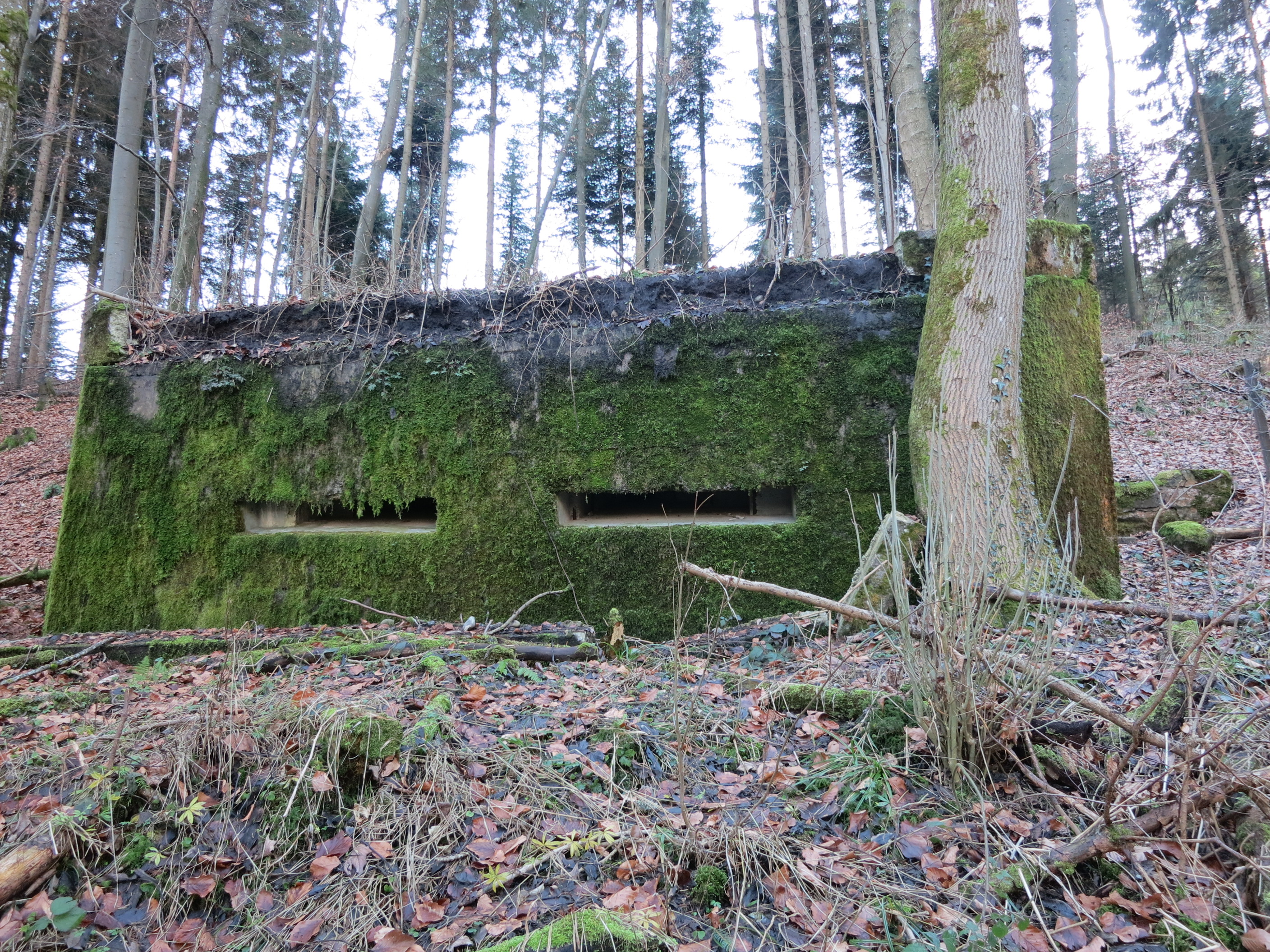 Fest Uetliberg, Zürich, Schweiz